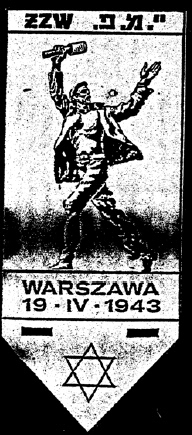 zzw2